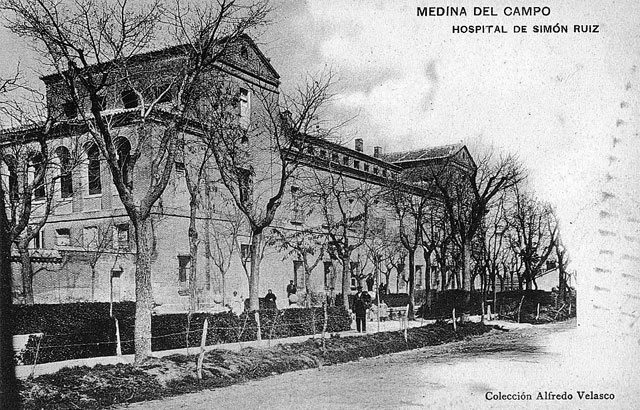 Hospital de Simón Ruiz - Medina del Campo (Valladolid) - Hauser y Menet - Madrid. Unión Postal Universal. Colección Alfredo Velasco. - Tarjeta postal. Papel 141 x 91 B/N